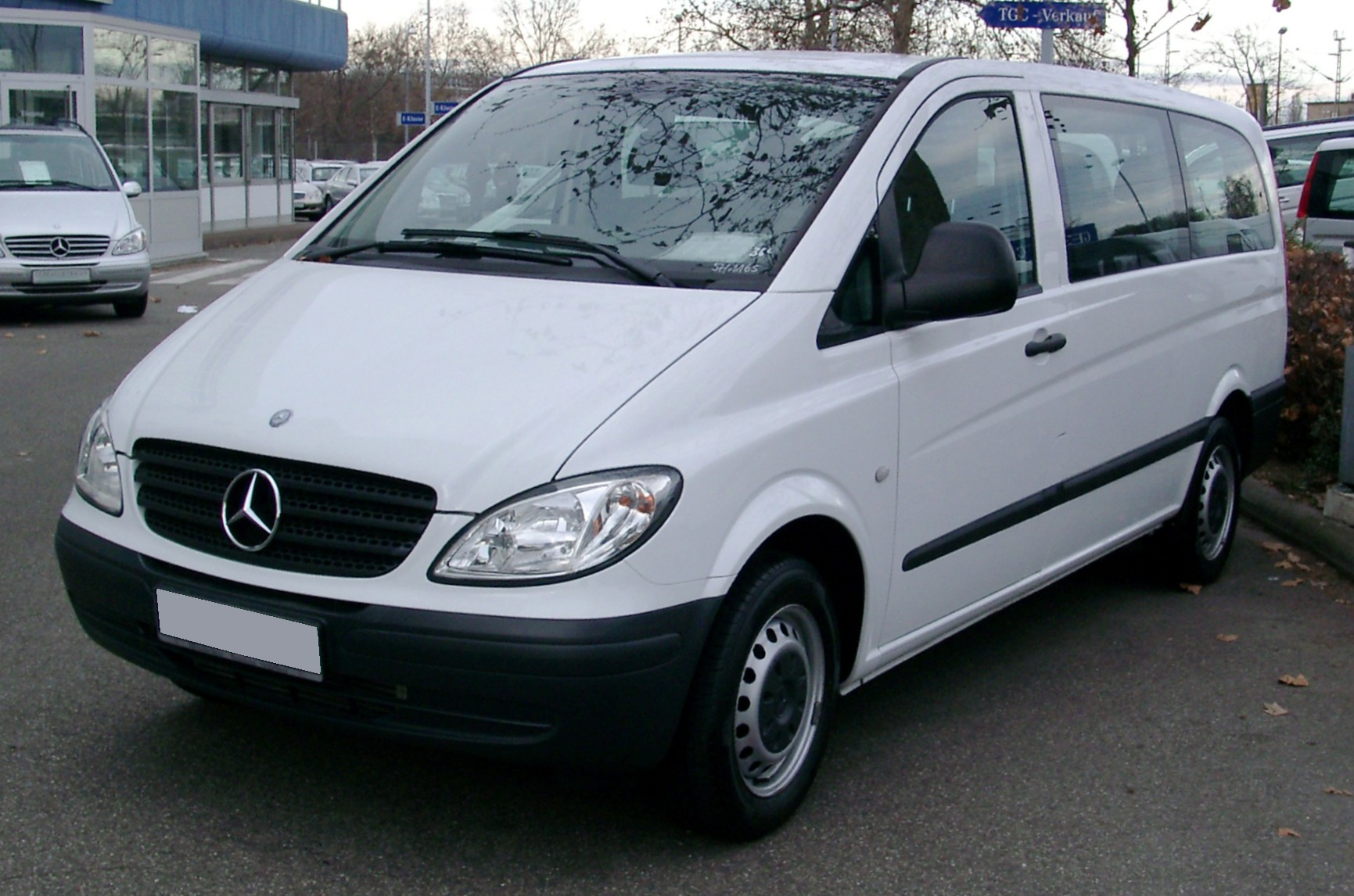 Mercedes-Benz W639 Vito